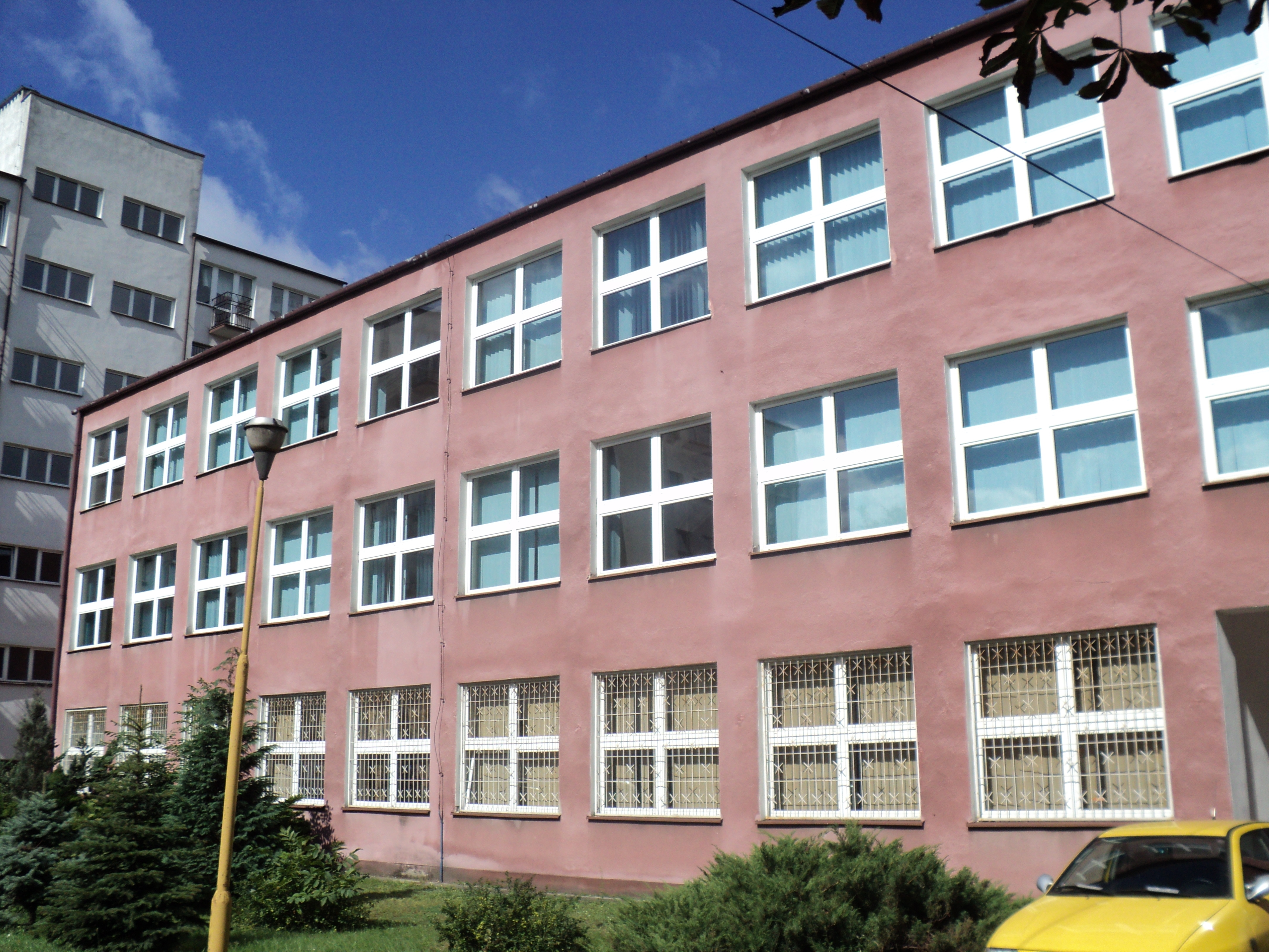 Siedziba Wyższej Szkoły Rozwoju Lokalnego w Żyrardowie (zdjęcie od ulicy Ossowskiego)